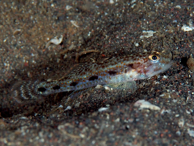 ユカタハゼ Hazeus otakii